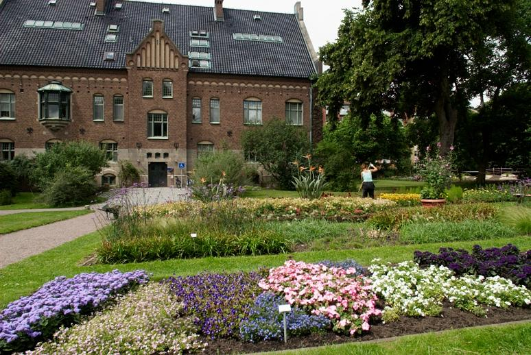 Museibyggnad. Trädgården anlades under 1860-talet under ledning av J G Agardh, på denna mark som redan tillhörde universitetet. Motiv: Botaniska trädgården i Lund Nyckelord: Byggnadsminnen:Statl Kategori: Botanisk trädgård, Museum Museibyggnad. Trädgården anlades under 1860-talet under ledning av J G Agardh, på denna mark som redan tillhörde universitetet.